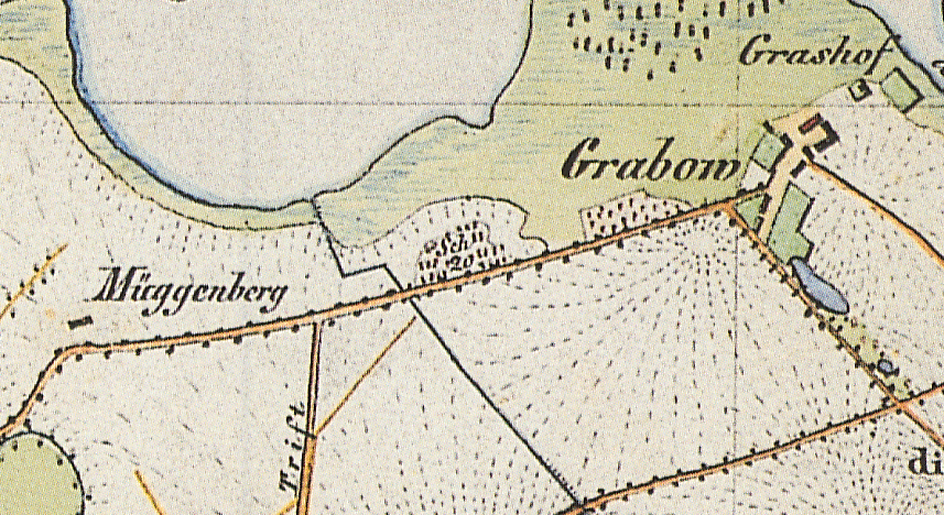 Grabow, Wohnplatz der Gemeinde Roskow, und das abgegangene Vorwerk Müggenburg, Gemarkung Lünow, ebenfalls Gemeinde Roskow, Lkr. Potsdam-Mittelmark, Brandenburg auf dem Urmesstischblatt 3541 Brandenburg an der Havel von 1839